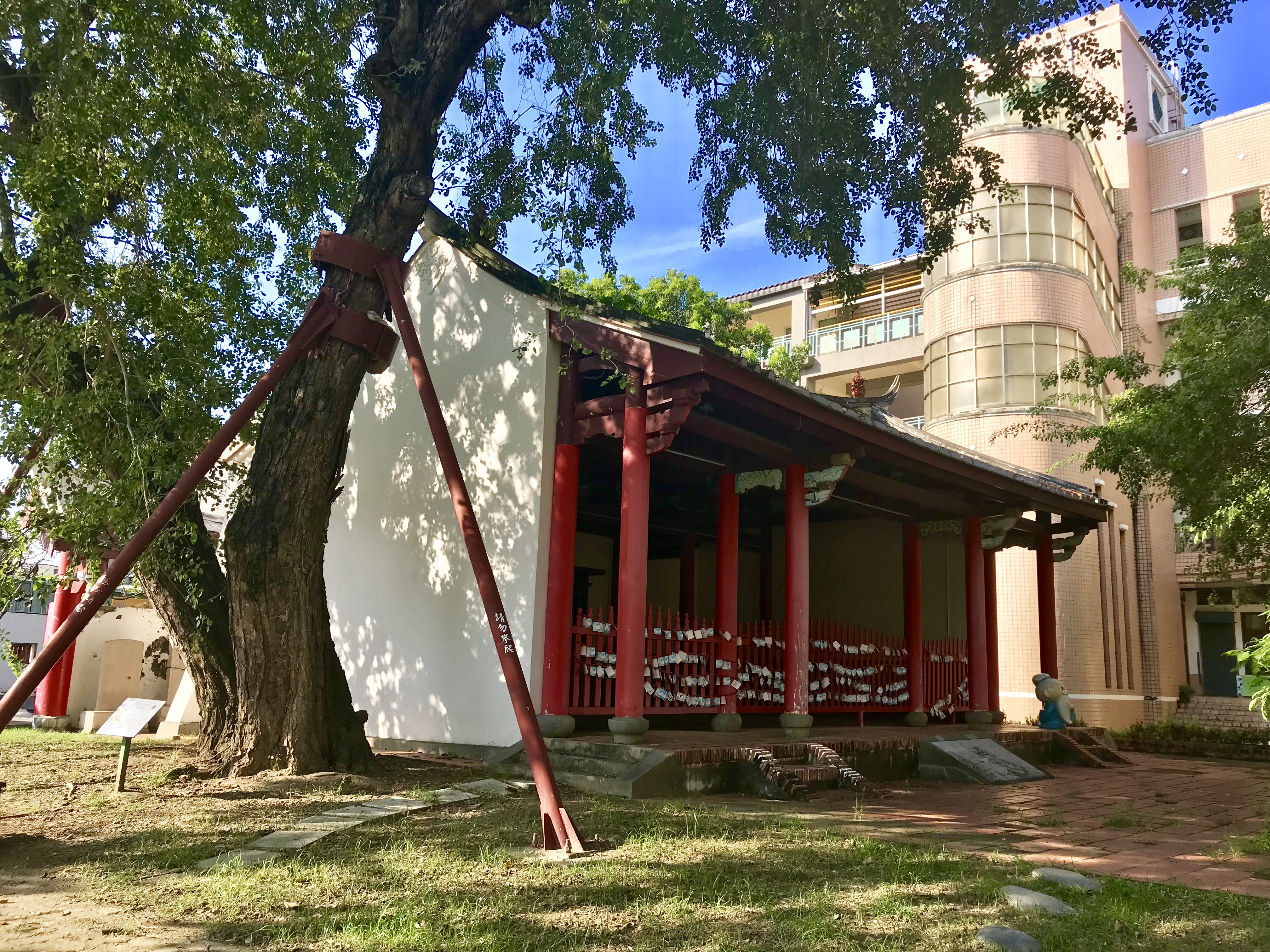 鳳山舊城孔子廟崇聖祠一景